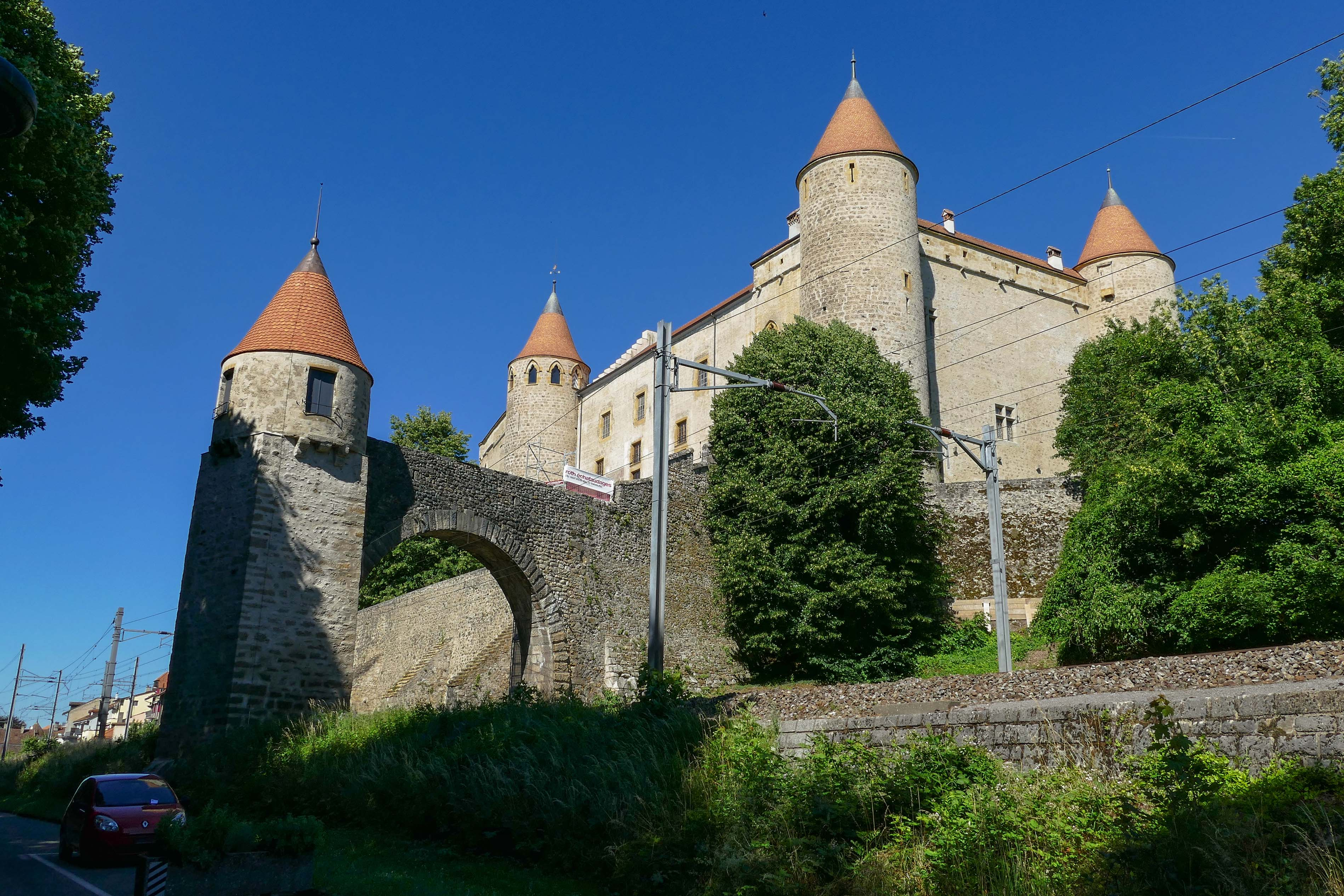 Château de Grandson